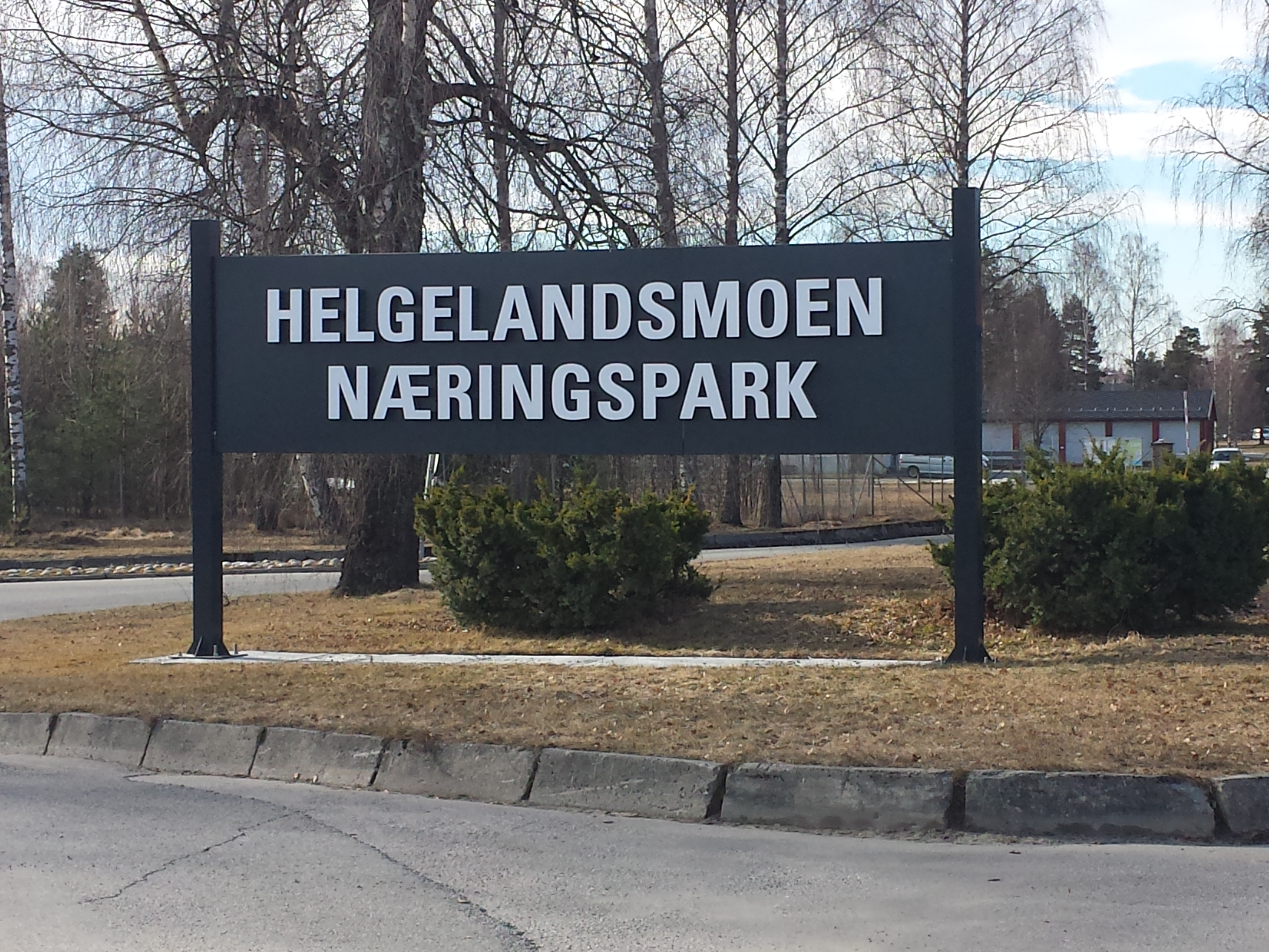 Skiltet står i krysset mellom Gomnesveien og Portveien